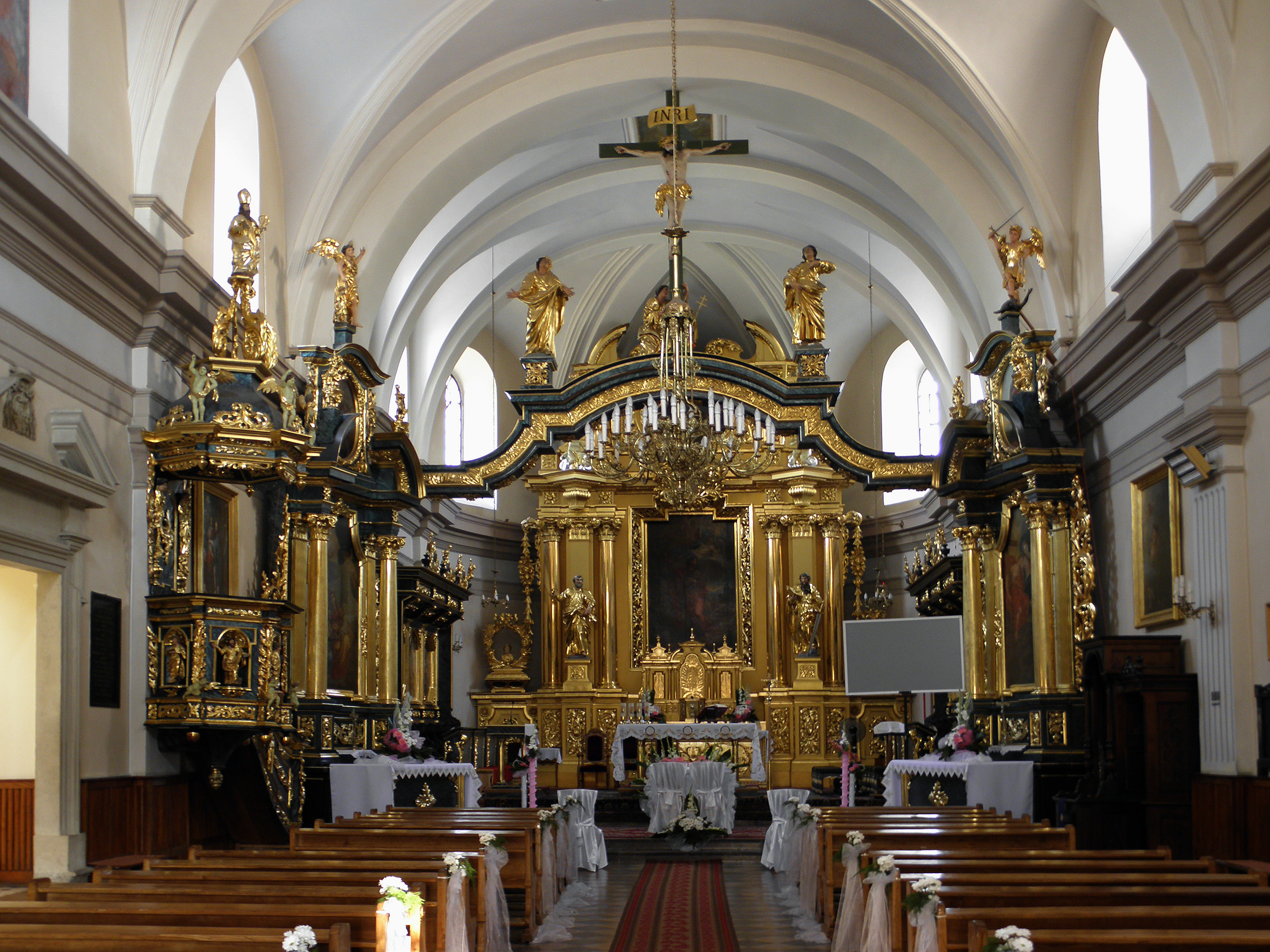 Skaryszew - wnętrze kościoła św.Jakuba.